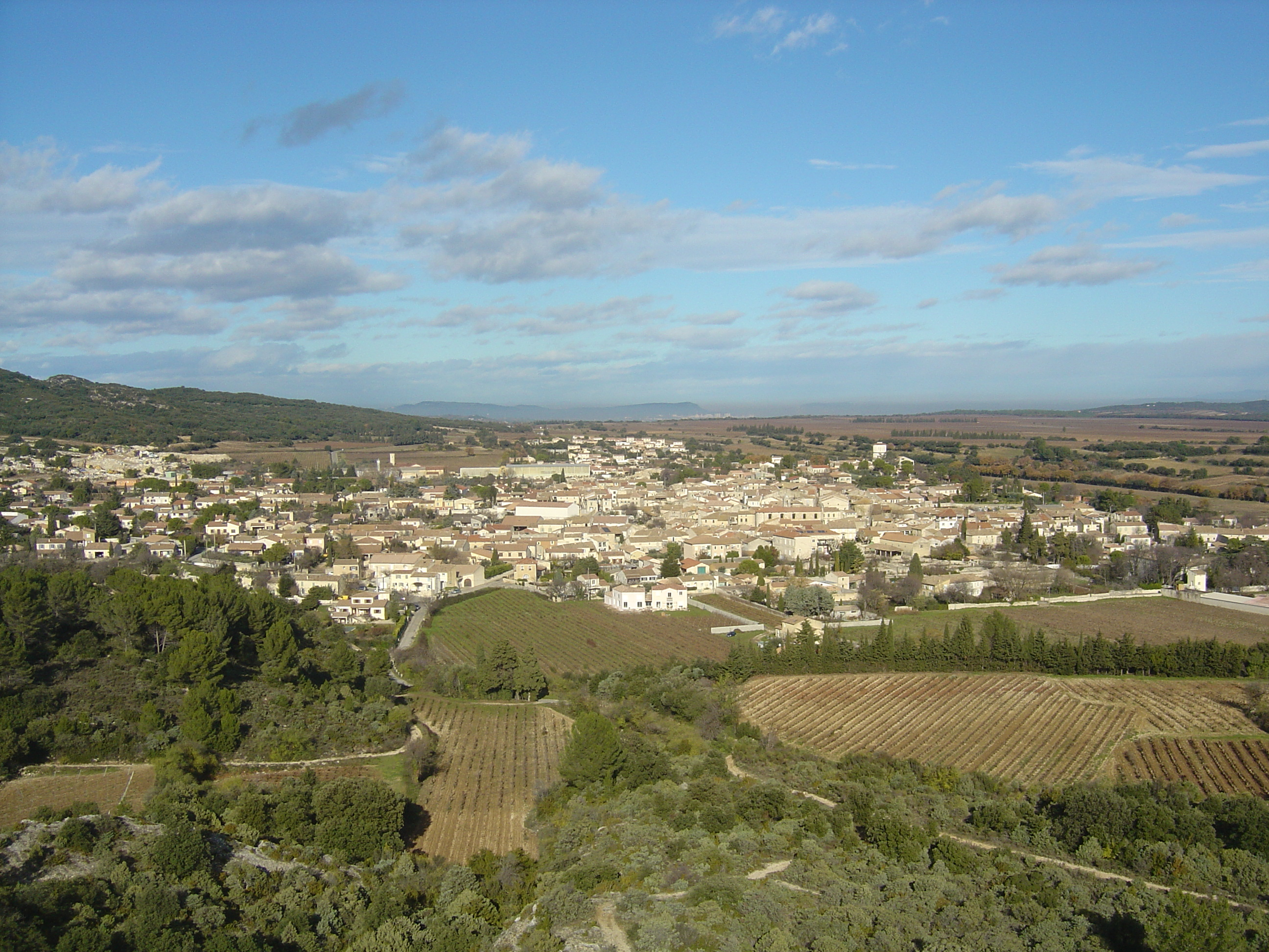 Vue générale de Tavel dans le Gard (30) depuis le château d'eau à côté de l'aire d'autoroute.